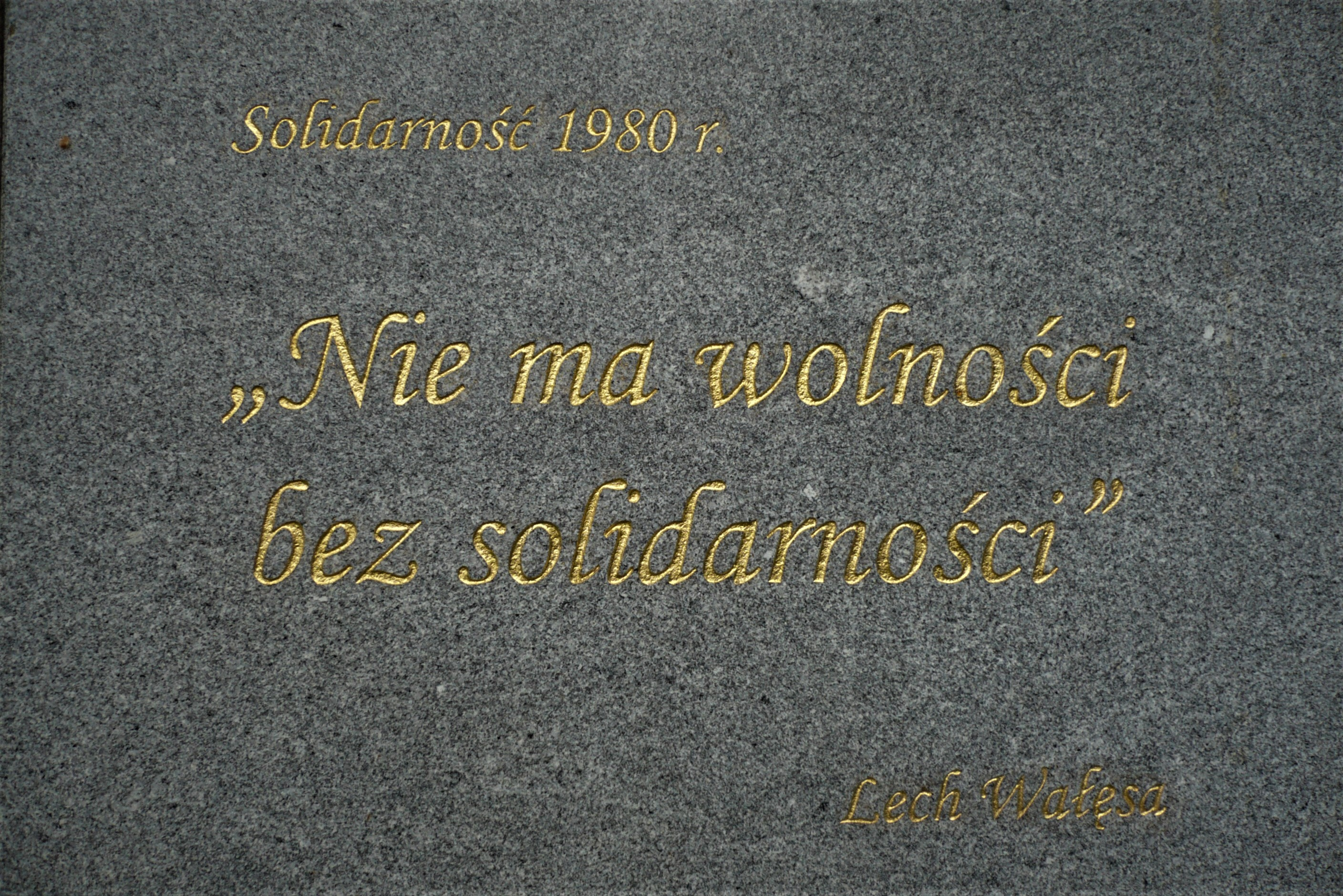 Borówkowa. Tablica